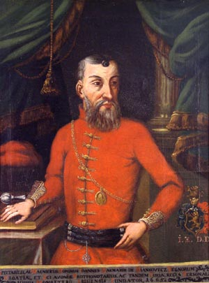 Ivan Zakmardi (mađ. Szakmárdi János) (Križevci, početkom 16. stoljeća - Banska Bistrica, 25. travnja 1667.), protonator hrvatskog kraljevstva